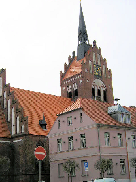 St.-Marien-Kirche, davor das Rathaus, in der Stadt Usedom, Mecklenburg-Vorpommern